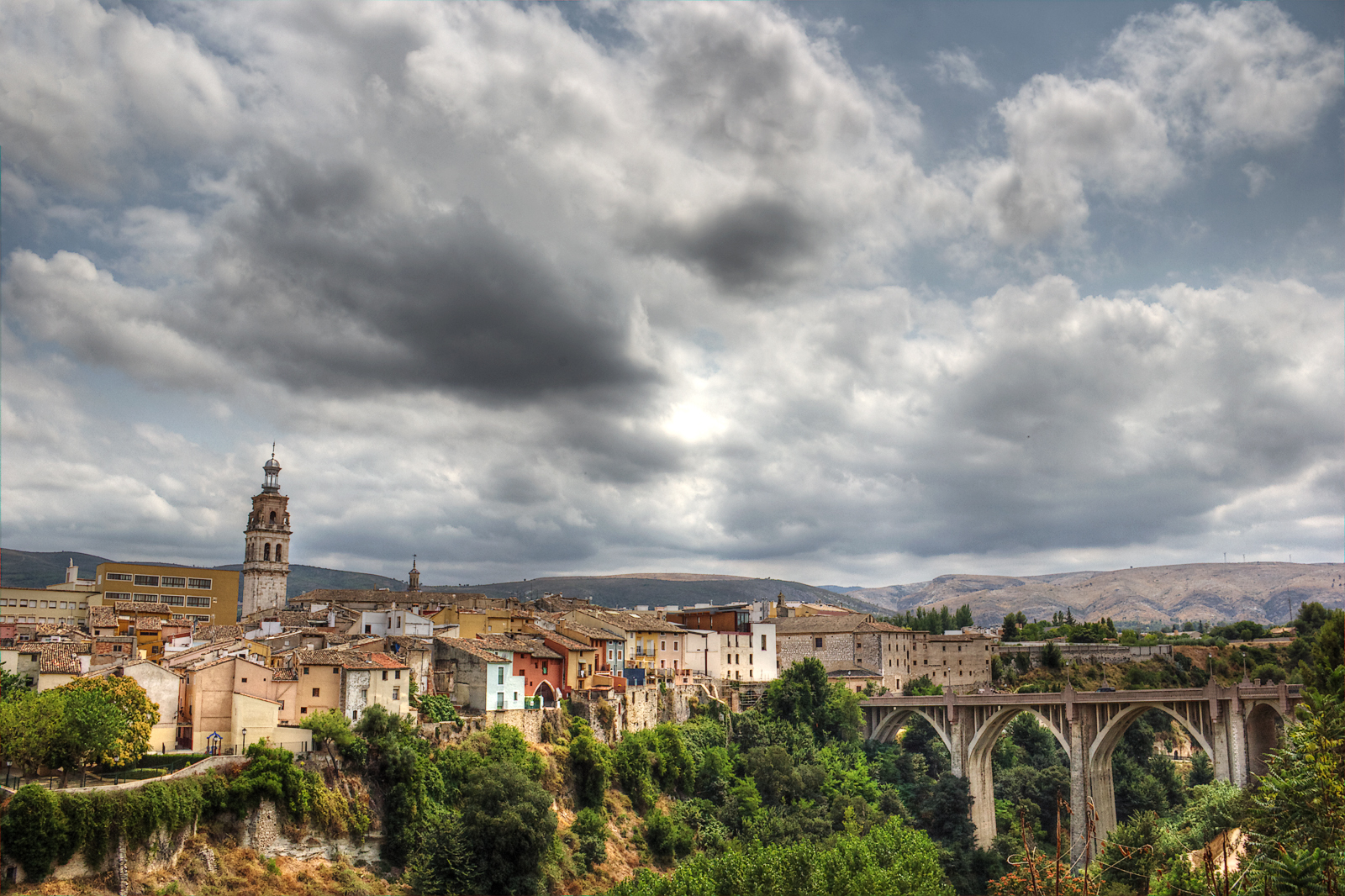 Vista del casco antiguo de Ontinyent o "La Vila" con el campanario de la iglesia de Sta. Maria a la izquierda, la antigua muralla en el centro y el puente de Sta. Maria a la derecha